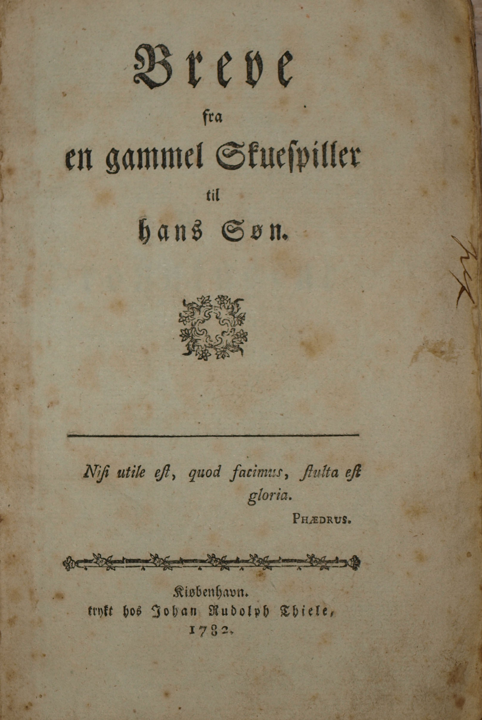 Titelbladet til Knud Lyne Rahbeks gennembrudsværk, Breve fra en gammel Skuespiller til hans Søn fra 1782.